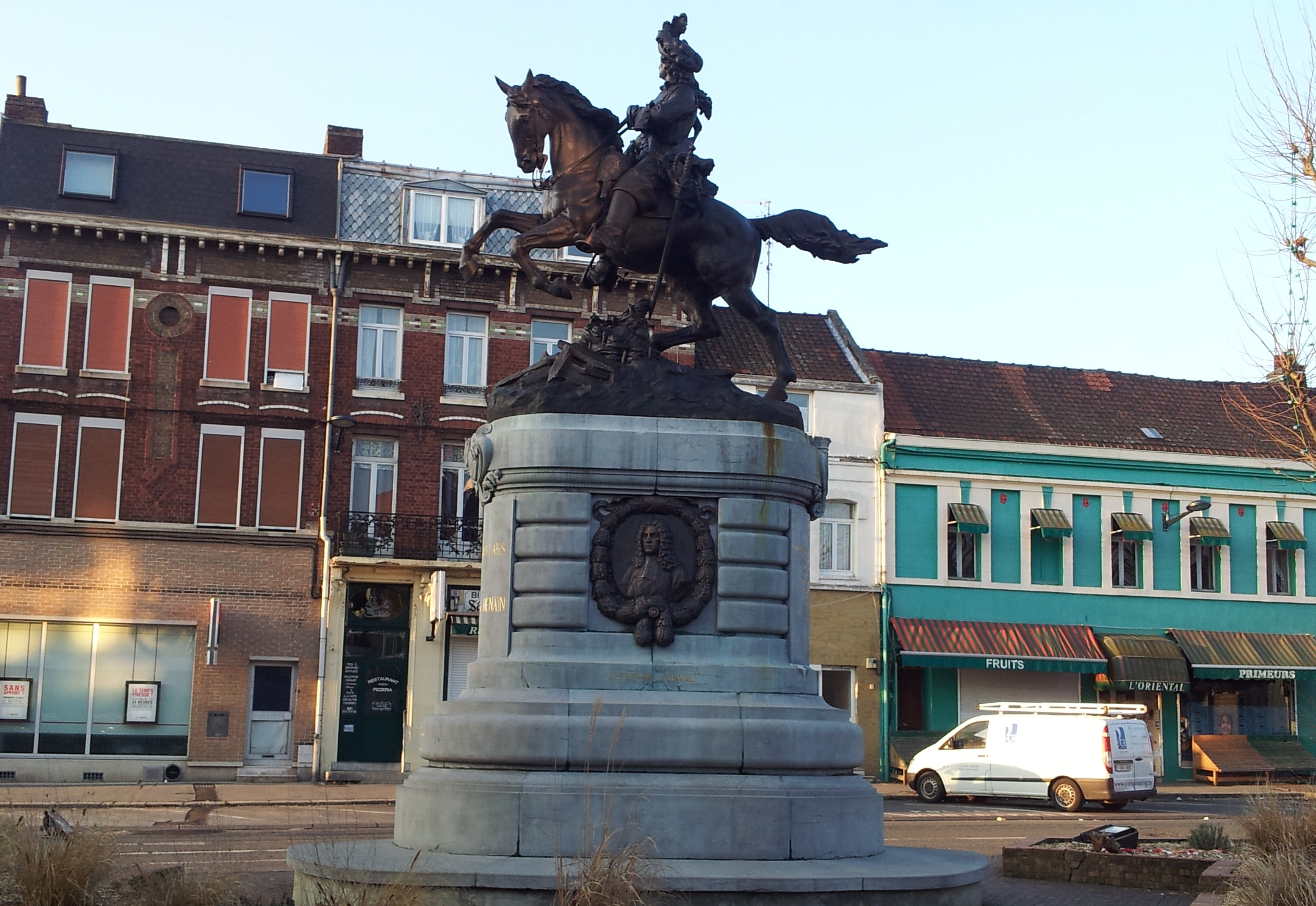 Denain - Statue du maréchal de Villars (59220 - dép : Nord-Pas-de-Calais).